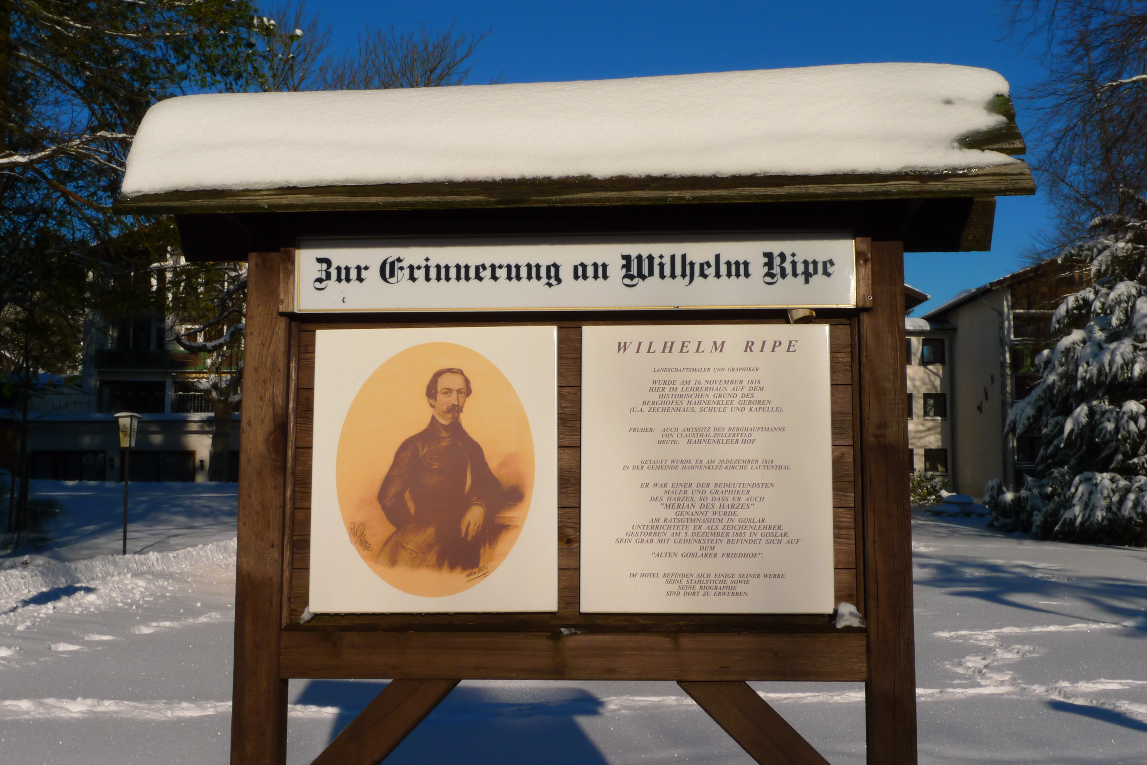 Gedenktafel für Wilhelm Ripe auf dem Grundstück des ehemaligen Geburtshauses in Hahnenklee. Die Gedenktafel wurde mittlerweile entfernt.